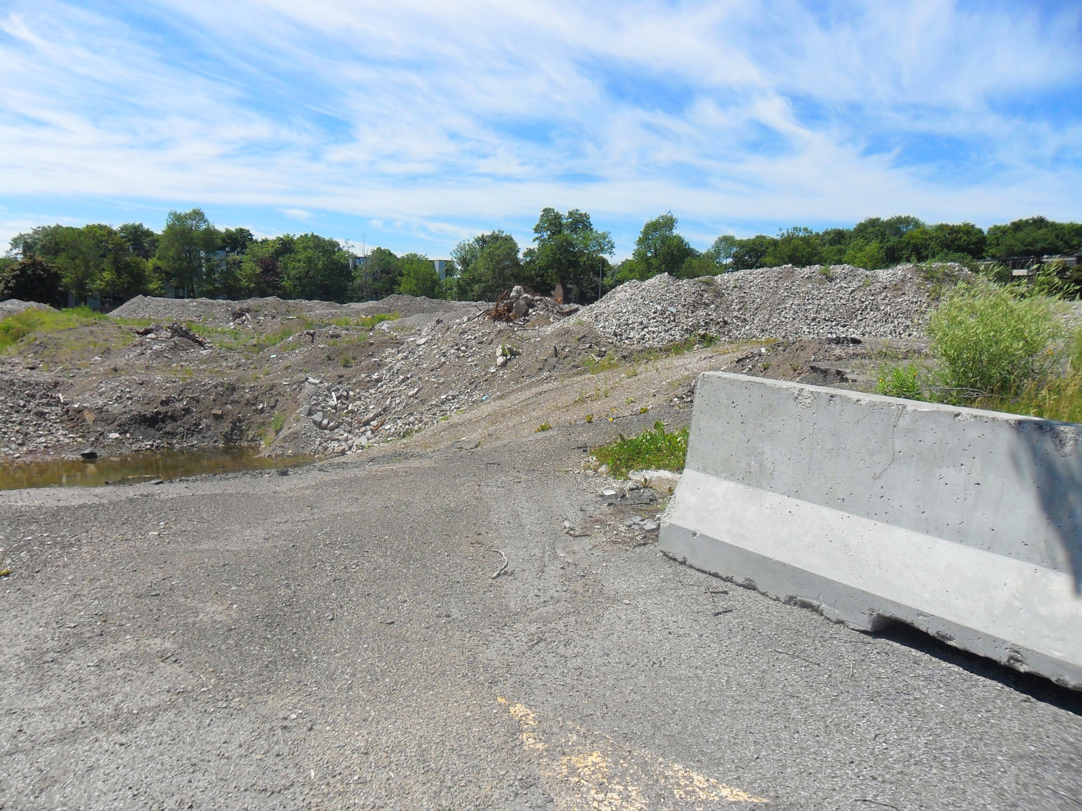 Terrain au coin des rues Laurier/Lavigerie 2016